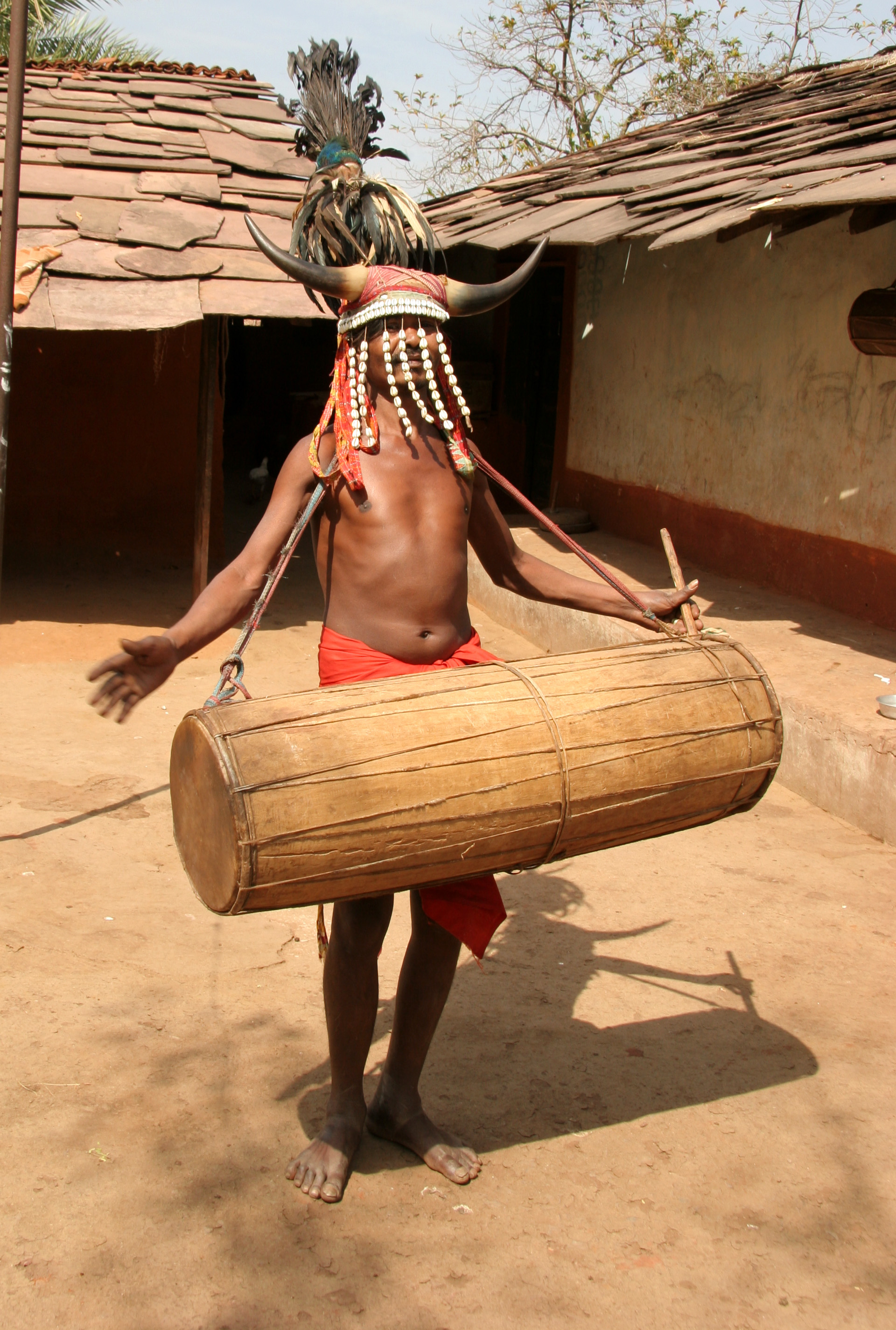 inde bastar homme muria costumé en bison pour la danse